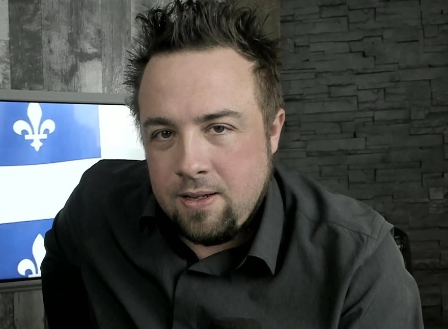 Screenshot des Youtubers und Biologen Jean-François Gariépy in einem Stream seines Youtube-Kanals "The Public Space". Gariépy trägt ein scharzes Hemd. Im Hintergrund befindet sich die Nationalflagge von Québec auf einem Monitor.